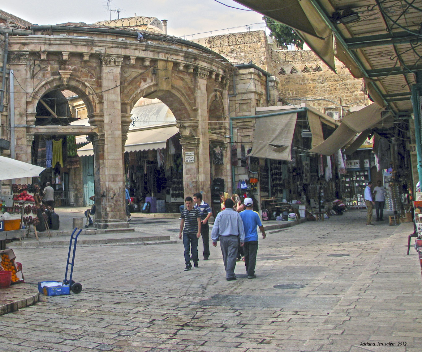 המוריסטן הוא השוק המרכזי של הרובע הנוצרי בעיר העתיקה בירושלים. הוא מורכב מרחובות, כיכרות, חנויות ובתי מלאכה הסובבים כיכר מרכזית ובה מזרקה גדולה.